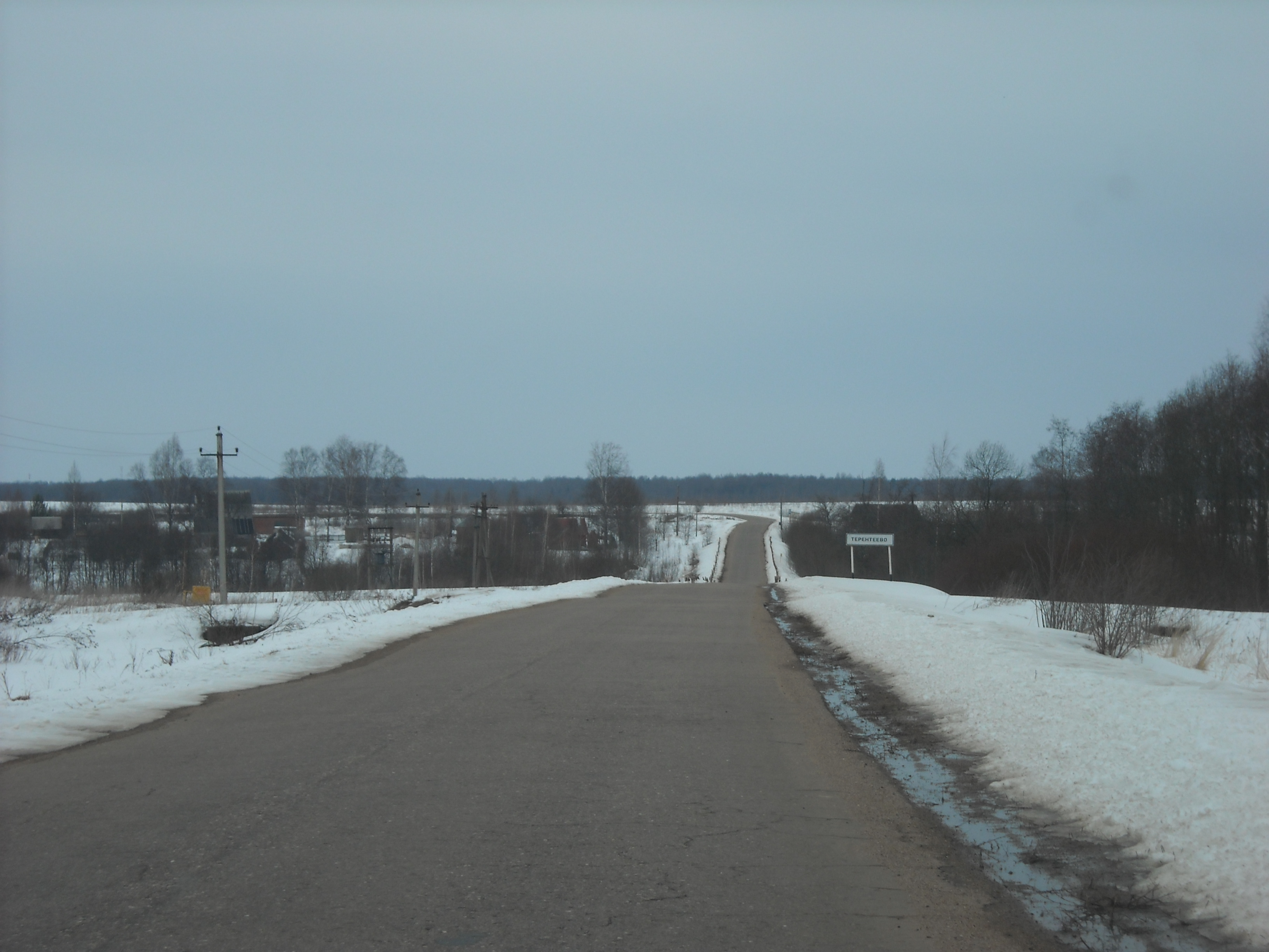 Terenteevo village Safonovo District